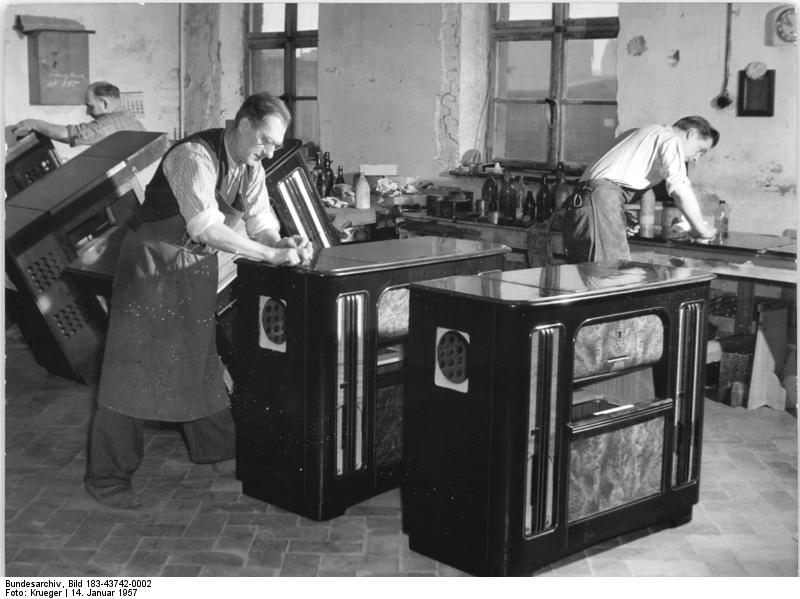 Luckenwalde, Tonmöbelfabrik, Polieren Zentralbild Krueger 14.1.1957 "Lohangrin" und "Caruso I" aus Luckenwalde. Als Zubringerbetrieb für den VEB Stern Radio Staßfurt baut die Tonmöbelfabrik Wilhelm Krschlok in Luckenwalde Musiktruhen. Seit einem Jahr läuft bereits die Serie von Typ "Lohangrin". Eine Entwicklung des Betriebes, die Musiktruhe "Caruso I" wird im starken Maße nach Westdeutschland exportiert. Die Inhaber des Betriebes, Herr Krschlok, der mit staatlicher Beteiligung arbeitet, bezeichnete die Materialversorgung, die Zusammenarbeit mit dem Rat des Kreises, den staatlichen Organen und der Notenbank als sehr gut. UBz: "Lohengrin"-Gehäuse in der Poliererei.